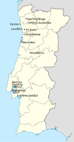 Carta dos clubes participantes do campeonato de portugal de futebol de primeira divisao 1966-1967